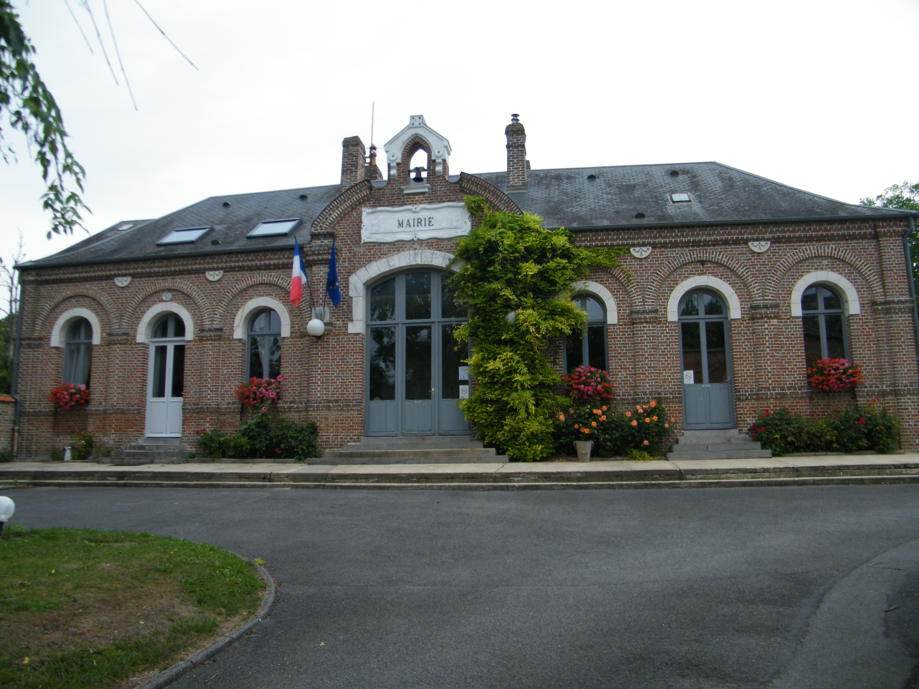 Mairie, Epagne-Epagnette, Somme, France